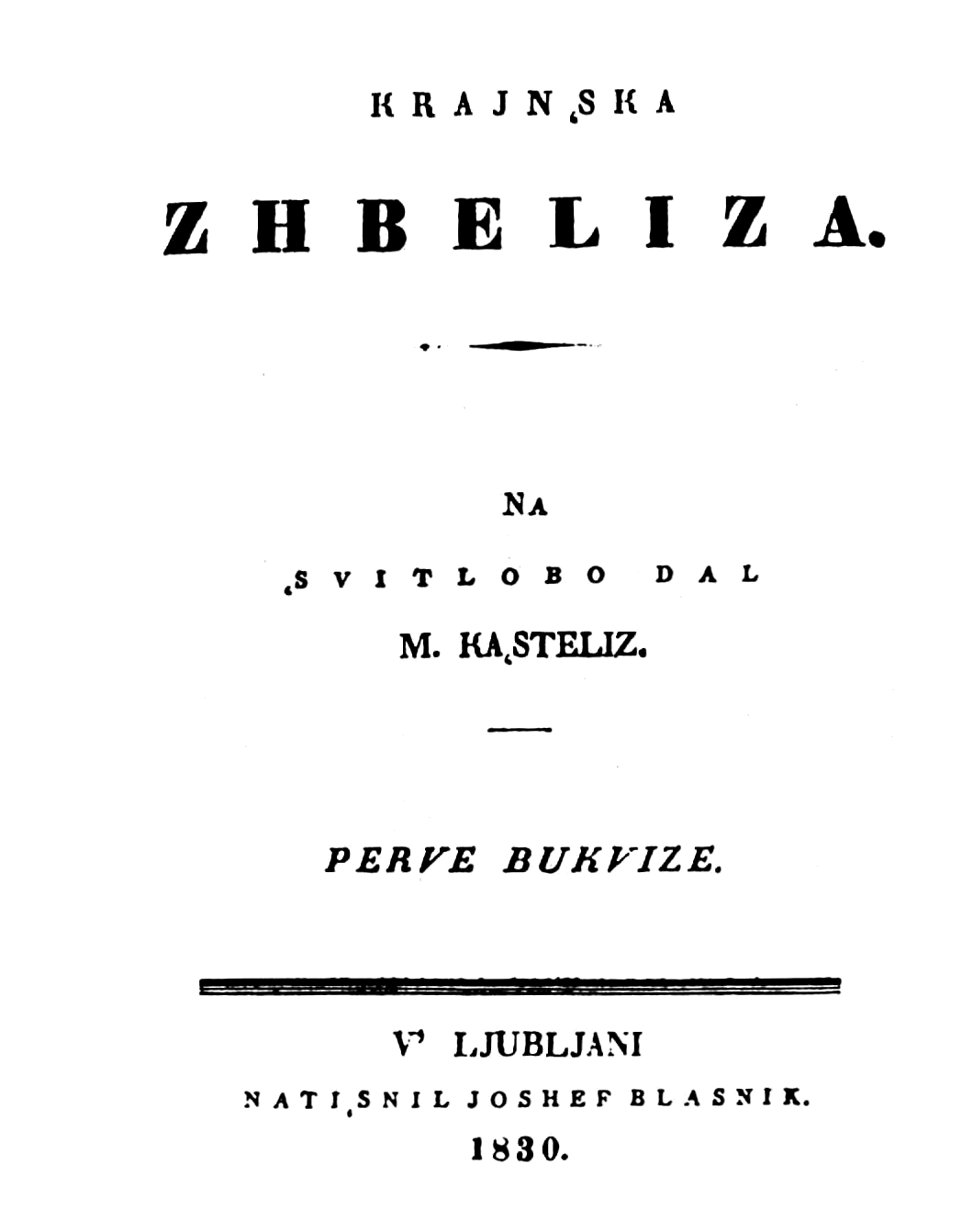 Naslovna stran Krajnske čbelice iz leta 1830.